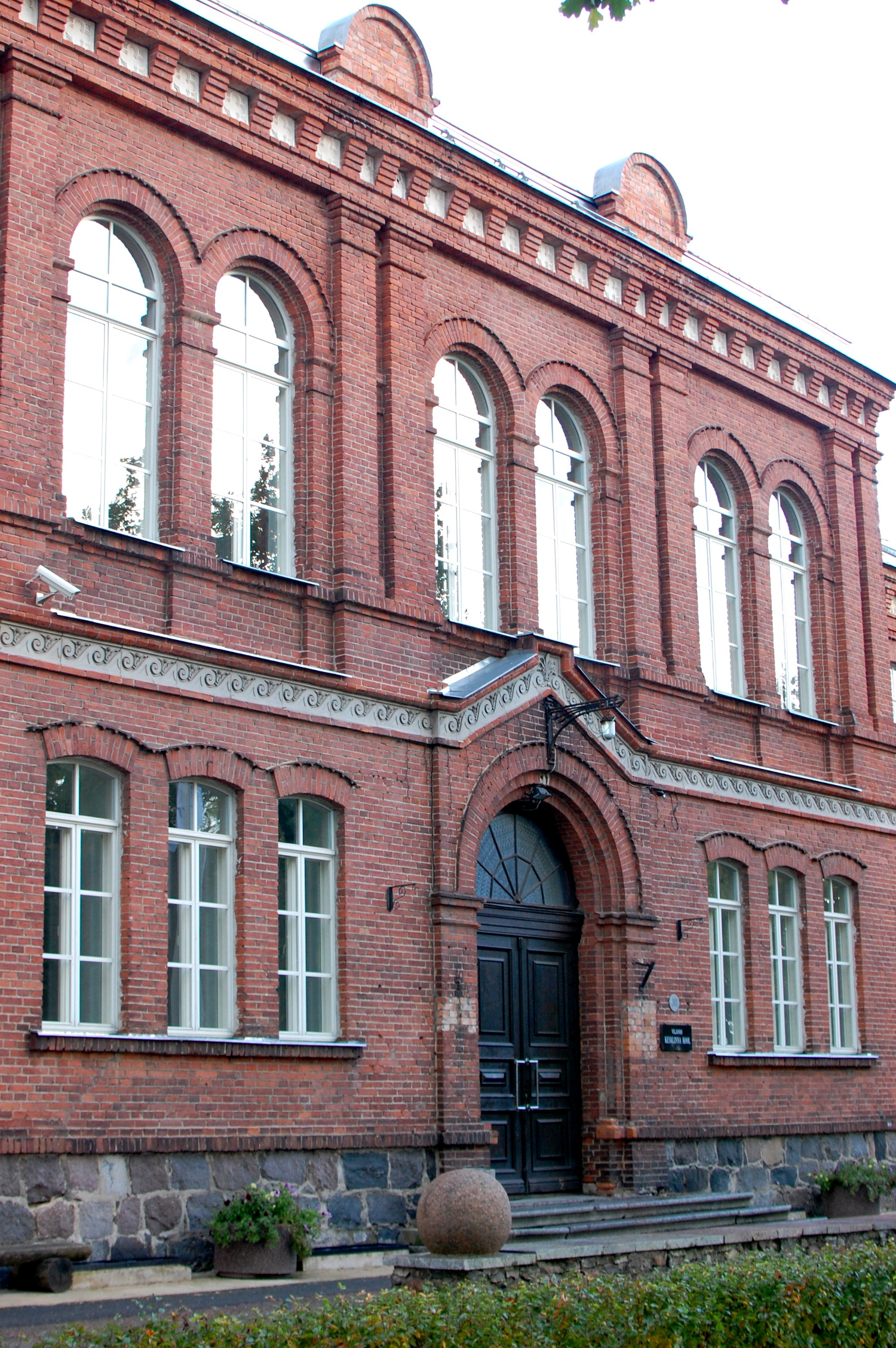 Viljandi maagümnaasiumi hoone, 1867-1877